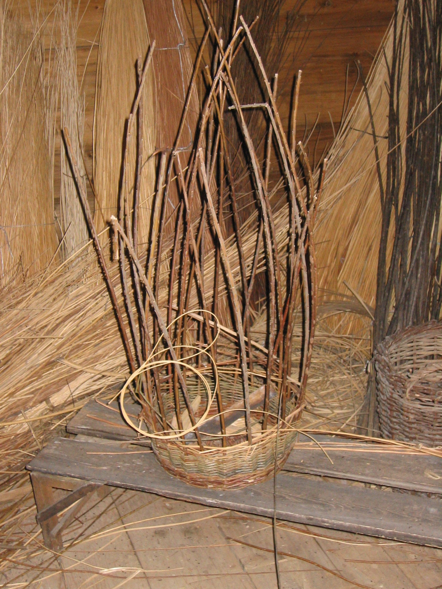 Korbflechten im Freilichtmuseum Neuhausen ob Eck